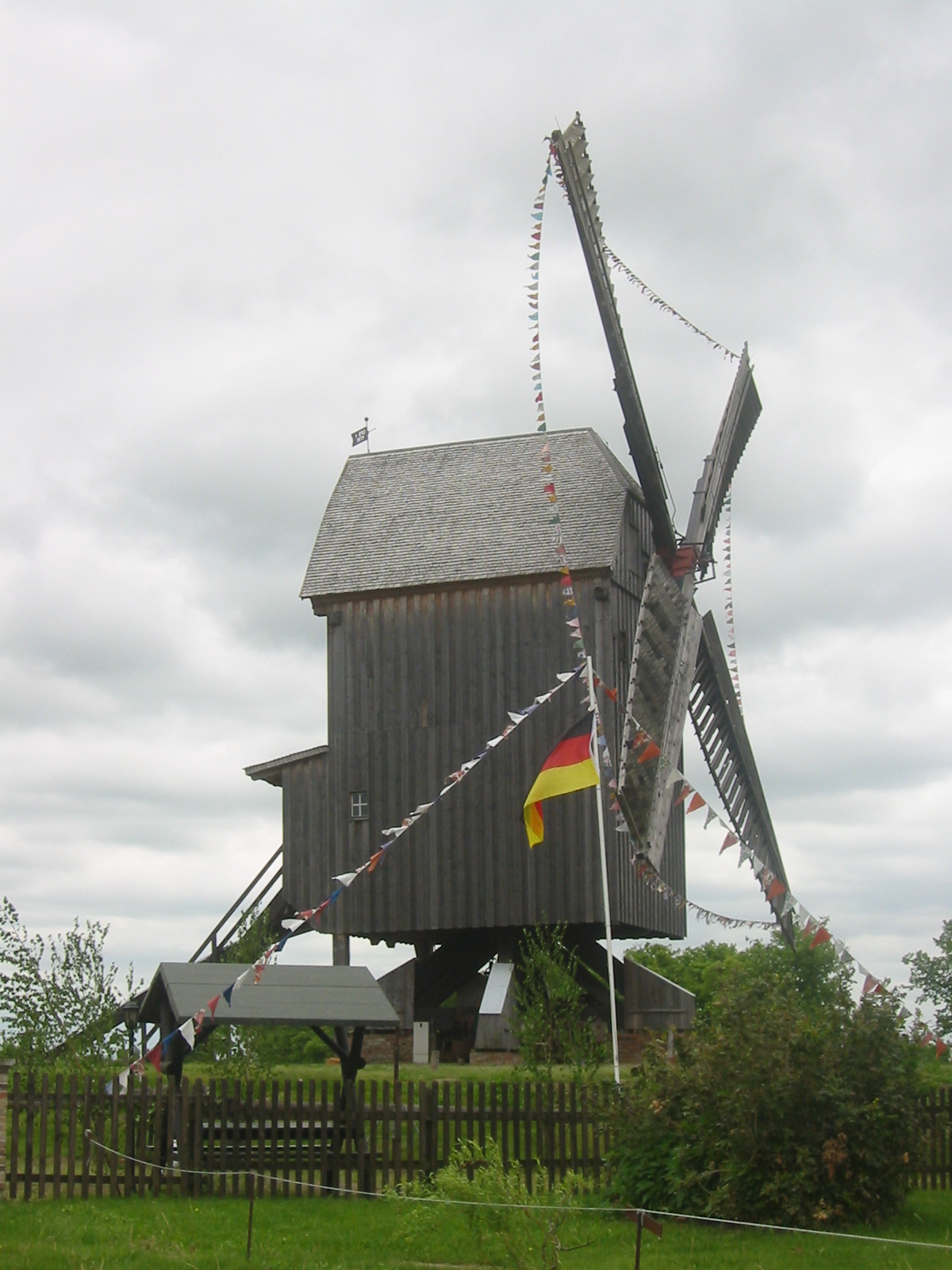 Bockwindmühle in Beelitz, Landkreis Potsdam-Mittelmark, Brandenburg